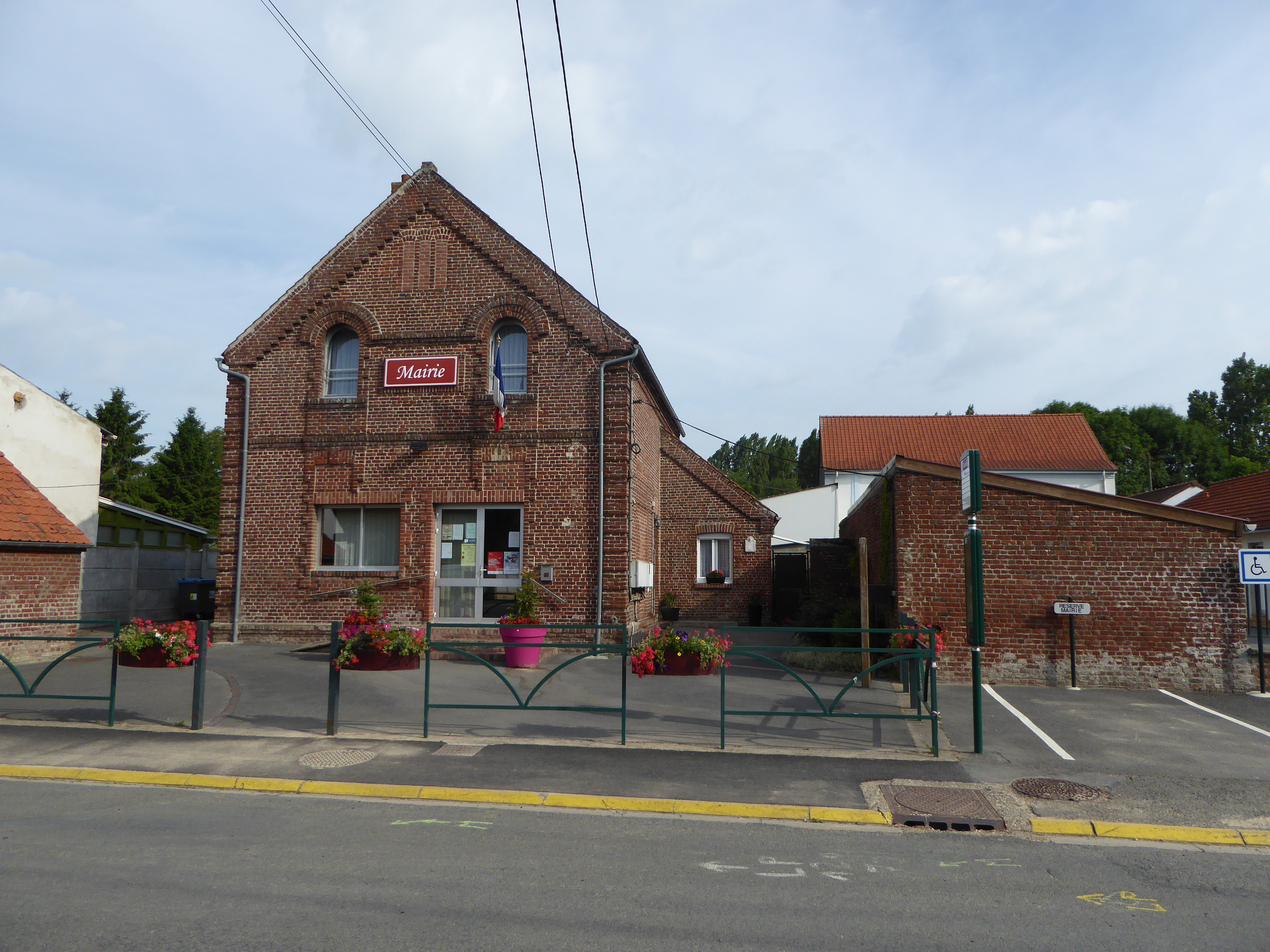 La mairie de Bajus (Pas-de-Calais, France) .